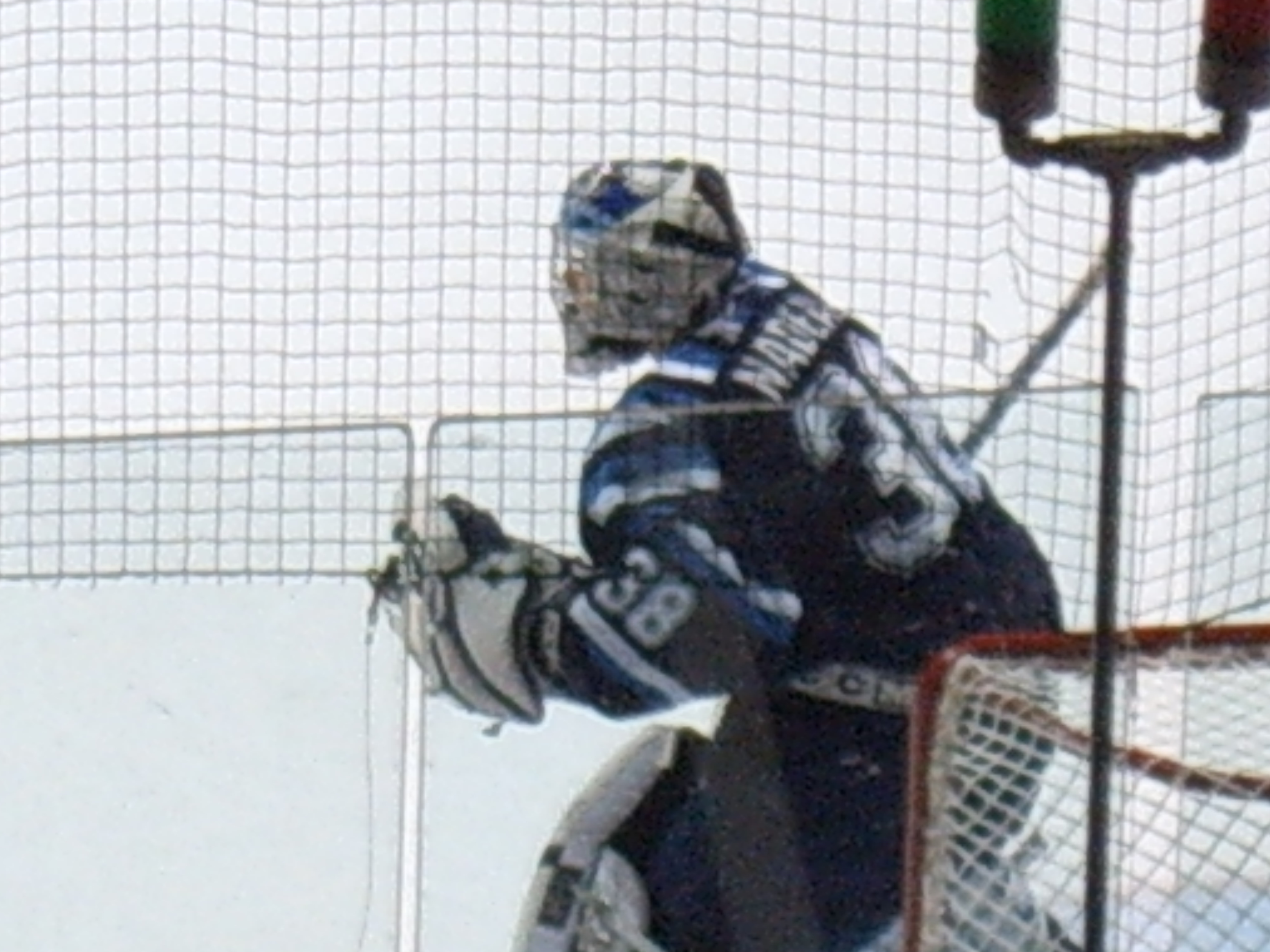 Bobby Nadeau, gardien de but des Saguenéens de Chicoutimi (2006-07)